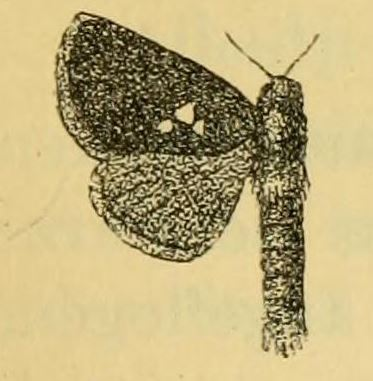 Metarbela triguttata